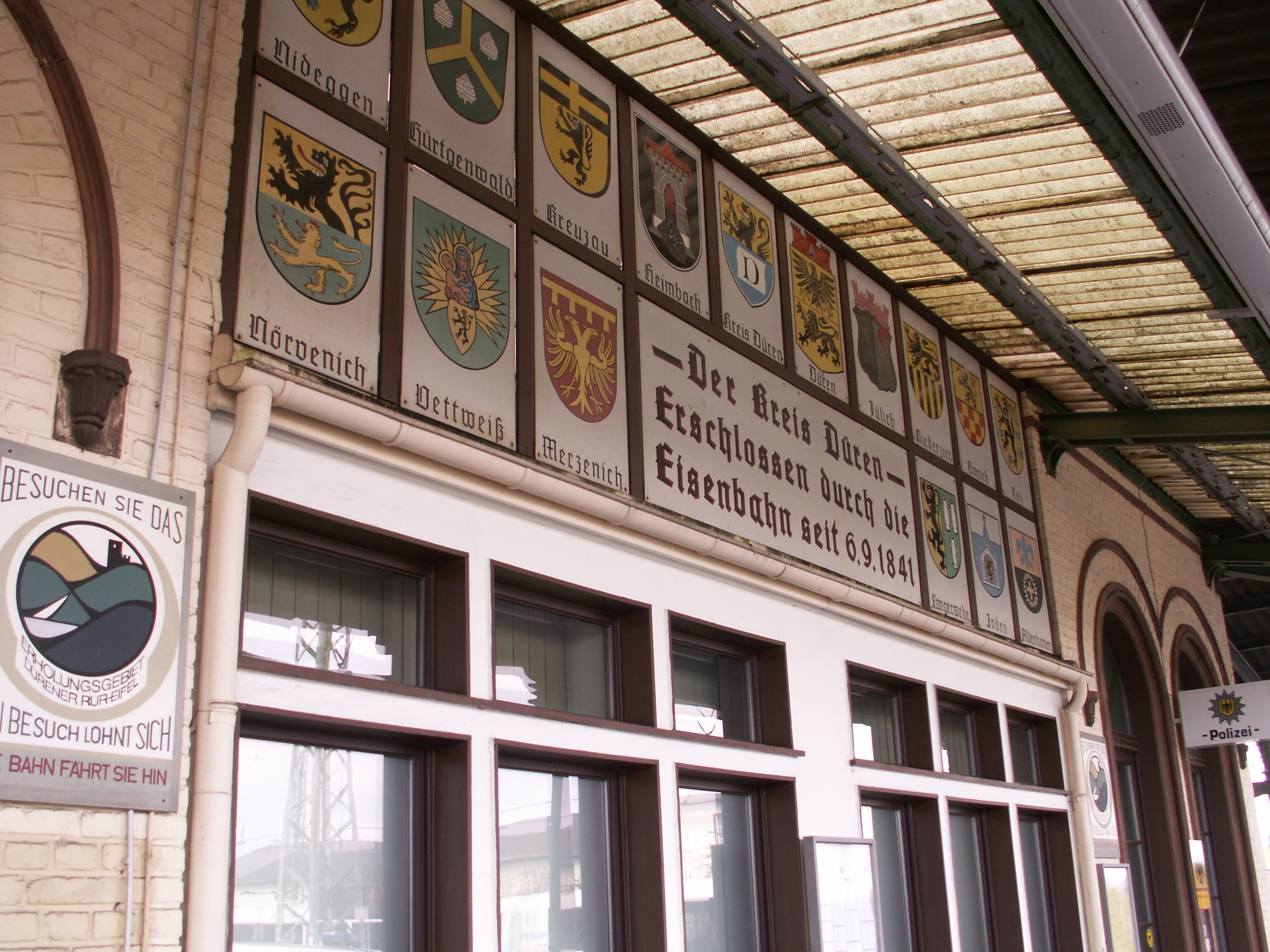 Düren Hbf